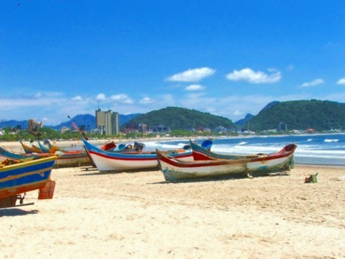 Praia do Cristo em Guaratuba.